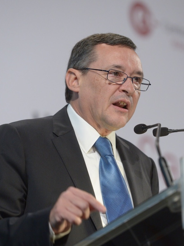 Dinar Cambra amb Àngel Simon, president executiu d'Agbar